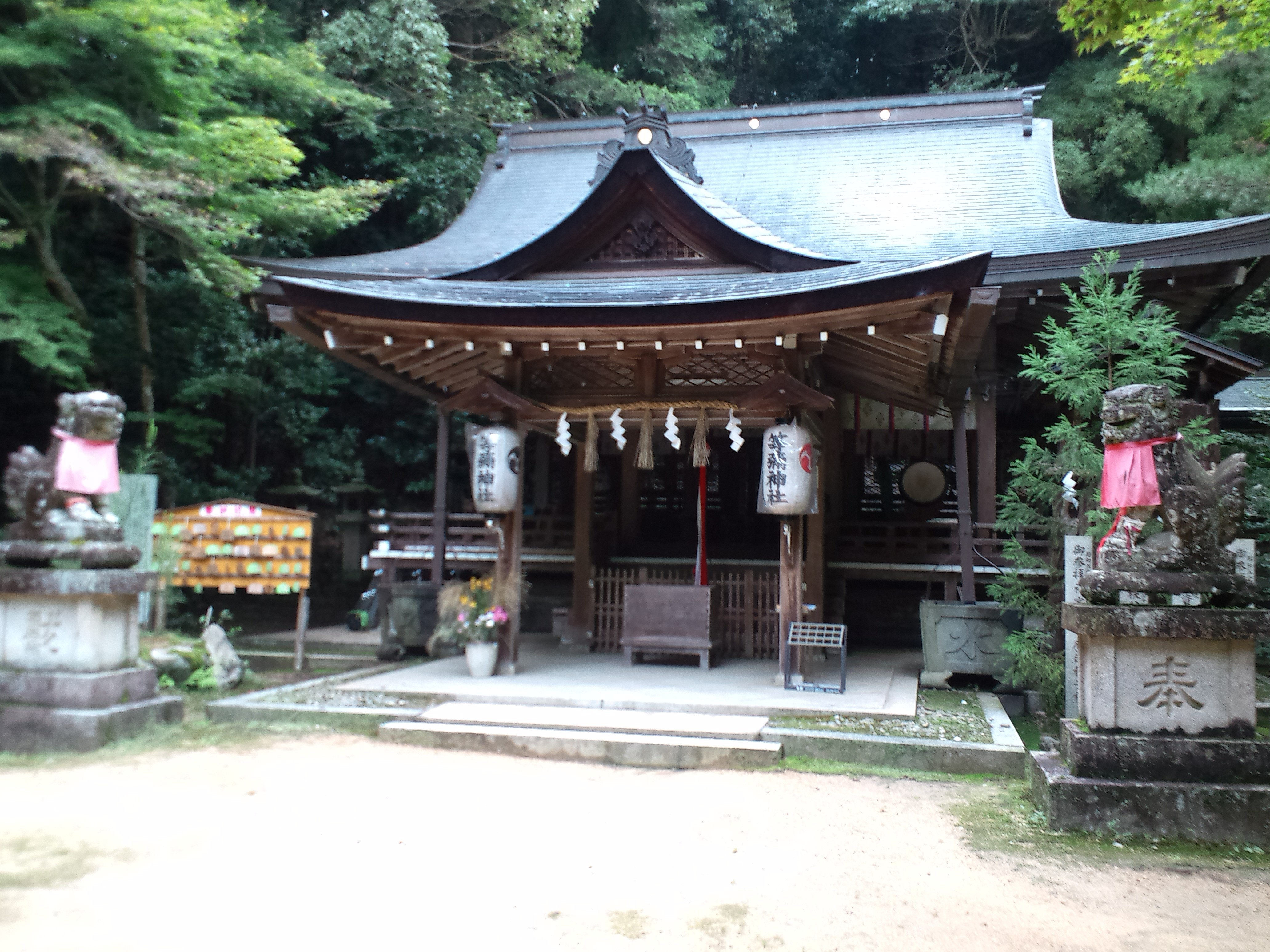 等彌神社 上ツ尾社